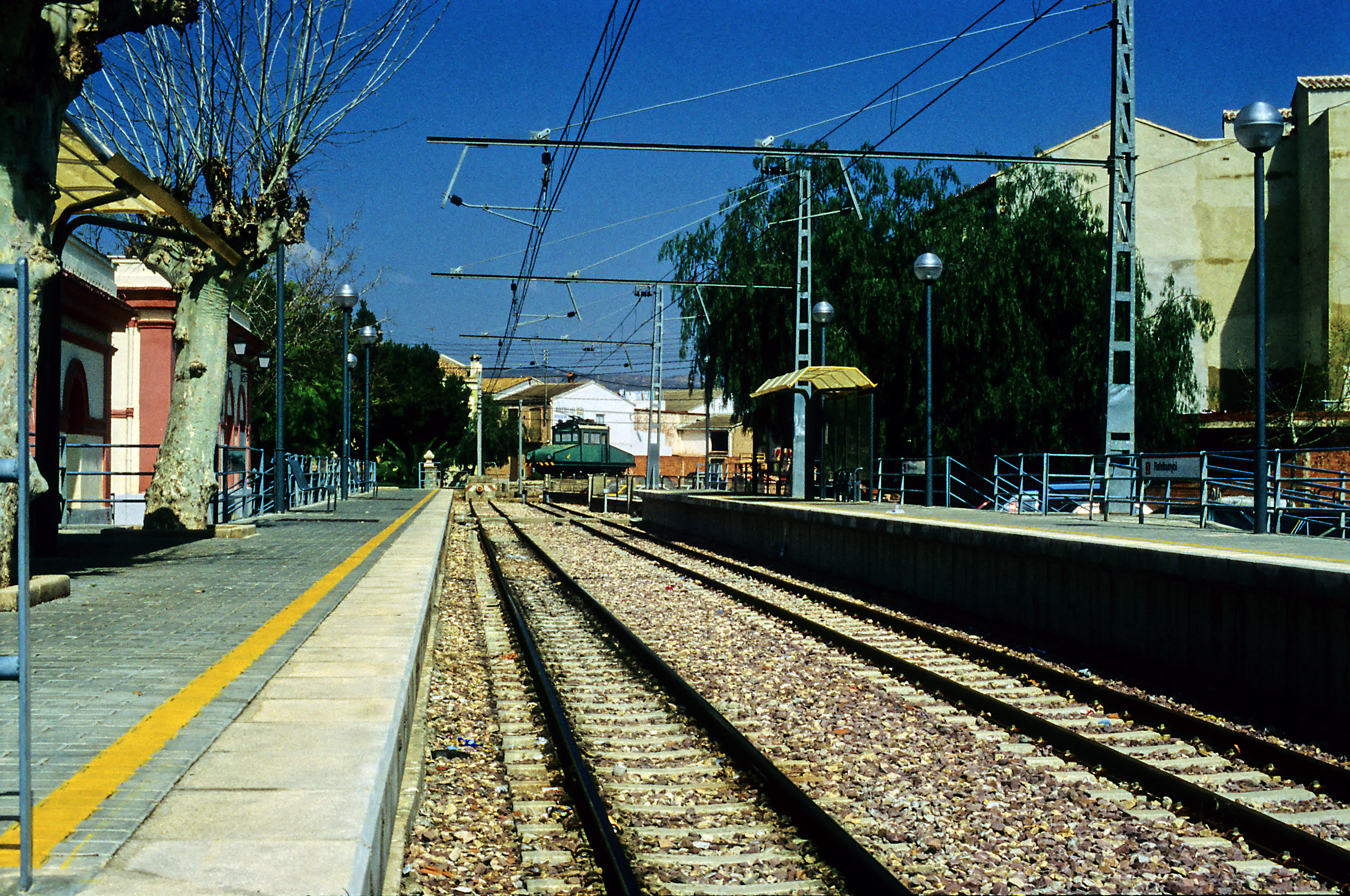 Richtung Norden zum Streckenende, die Anlage stammt noch von der alten FGV-Strecke vom Bahnhof Valencia Pont de Fusta. Nur die Bahnsteige wurden auf U-bahn-typische Maße erhöht. Ein Ausziehgleis zum Umsetzen von Triebfahrzeugen besteht wegen des ausschließlichen Triebwageneinsatzes schon länger nicht mehr. Während der Fallas de Valencia im März 1999.